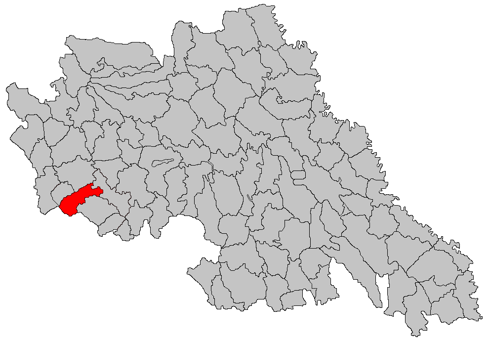 Categorie:Hărţi ale judeţului Iaşi